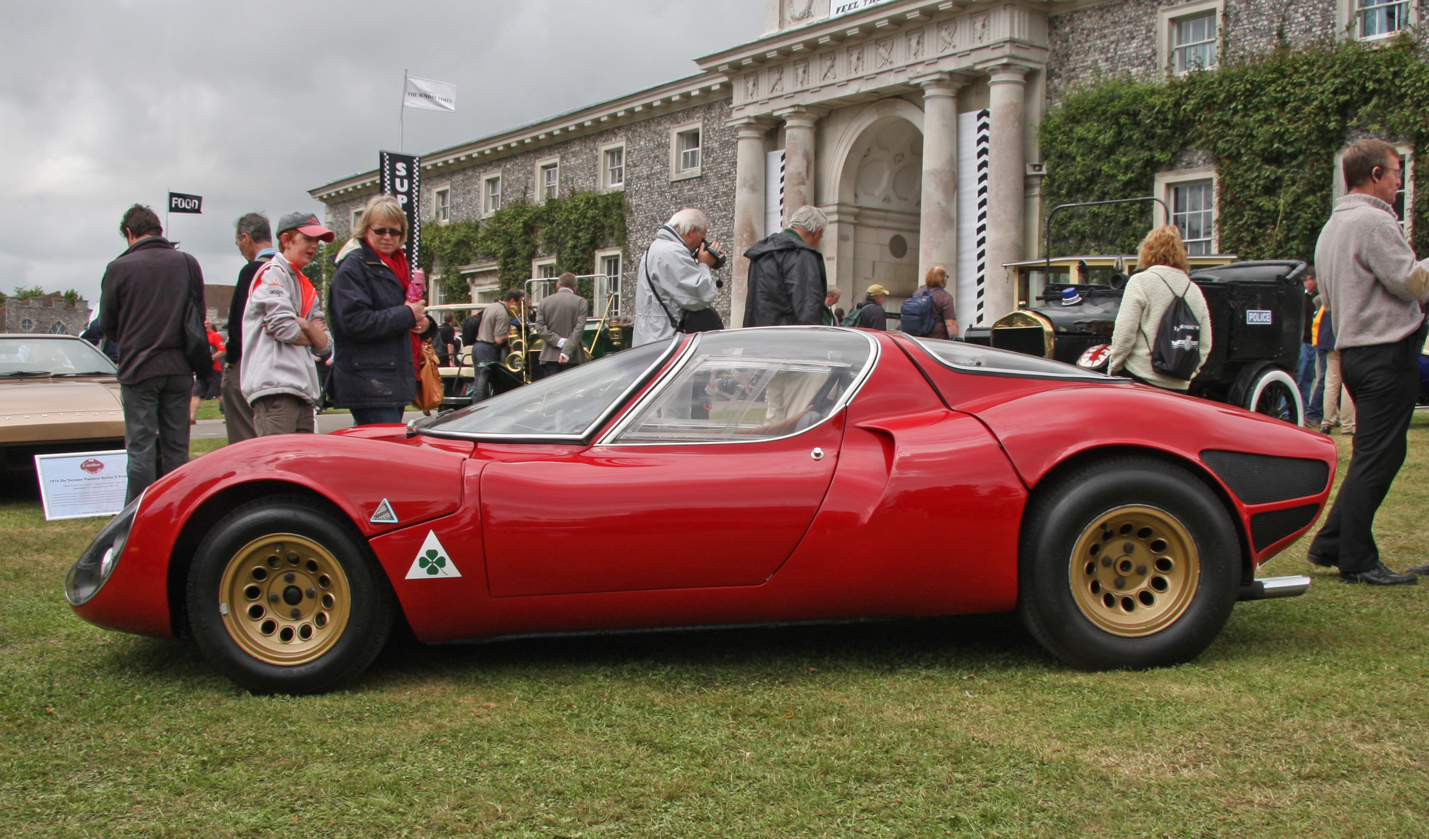 An Alfa Romeo Tipo 33 Stradale prototype